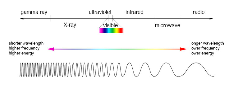 রেফারেন্স